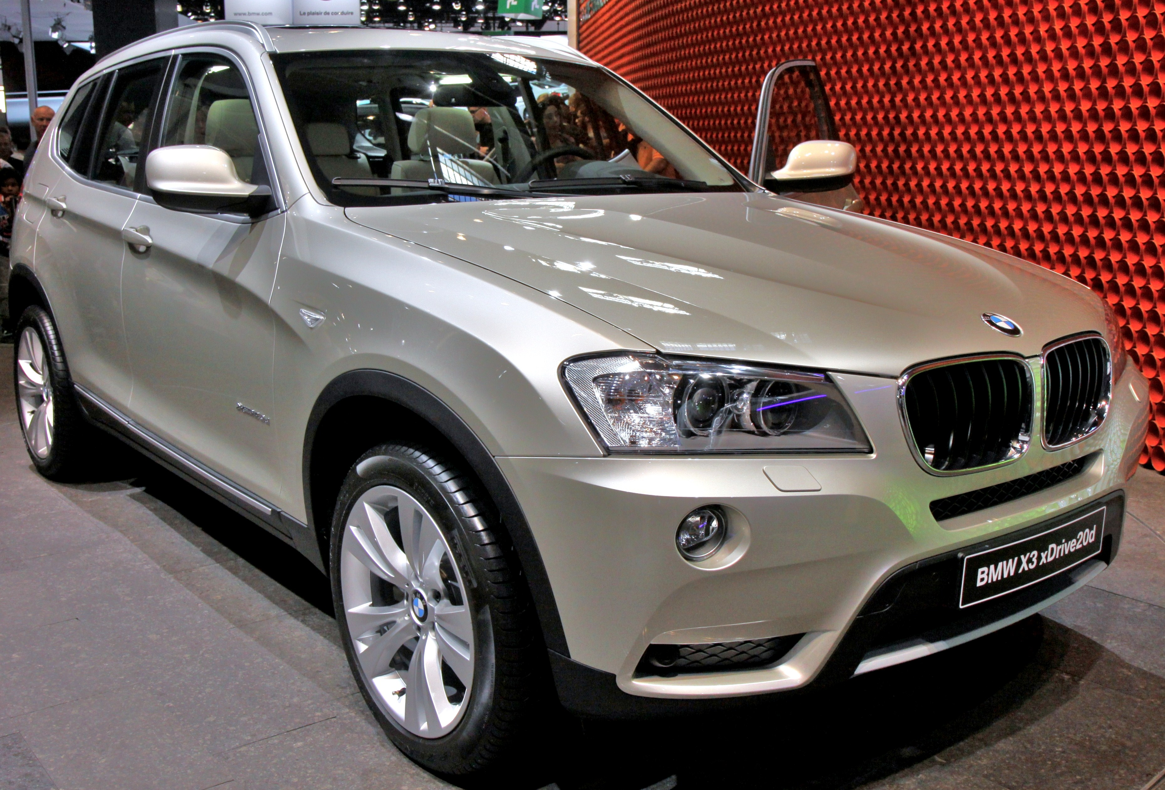 Paris - Mondial de l'automobile 2010